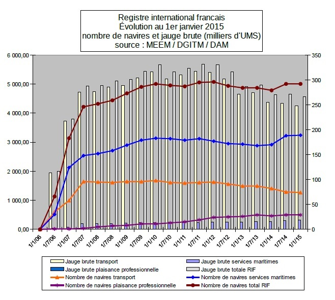 Évolution des navires immatriculés au RIF en nombre et en jauge depuis 2005.